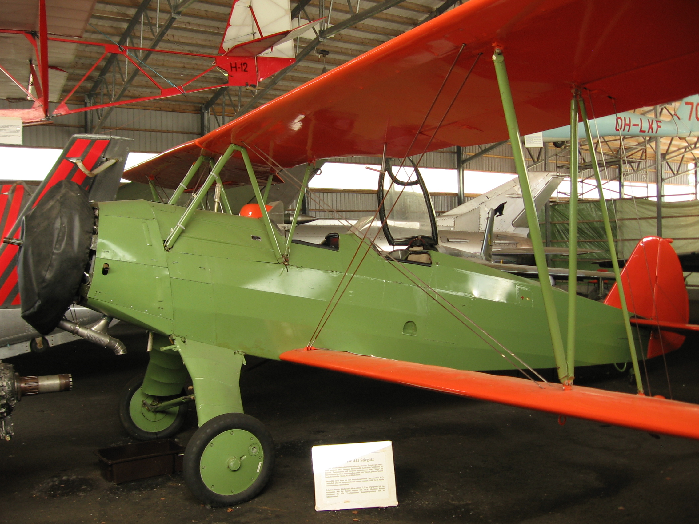 Focke-Wulf Fw 44 Stieglitz, Karhulan ilmailukerhon lentomuseo, Kotka